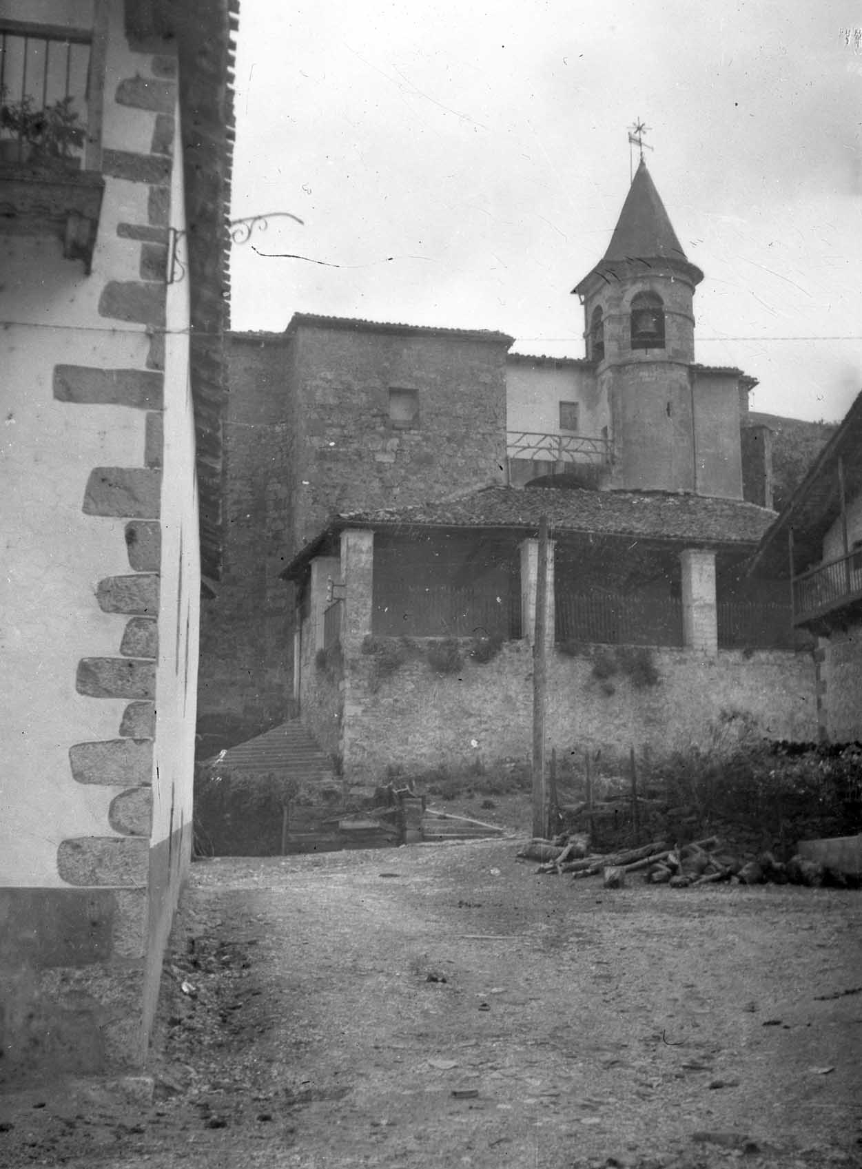 Elizaren ikuspegia.